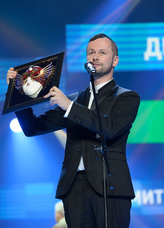 Церемония награждения премией «Золотая маска» — 2013 года.